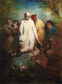 "Fête Champêtre"